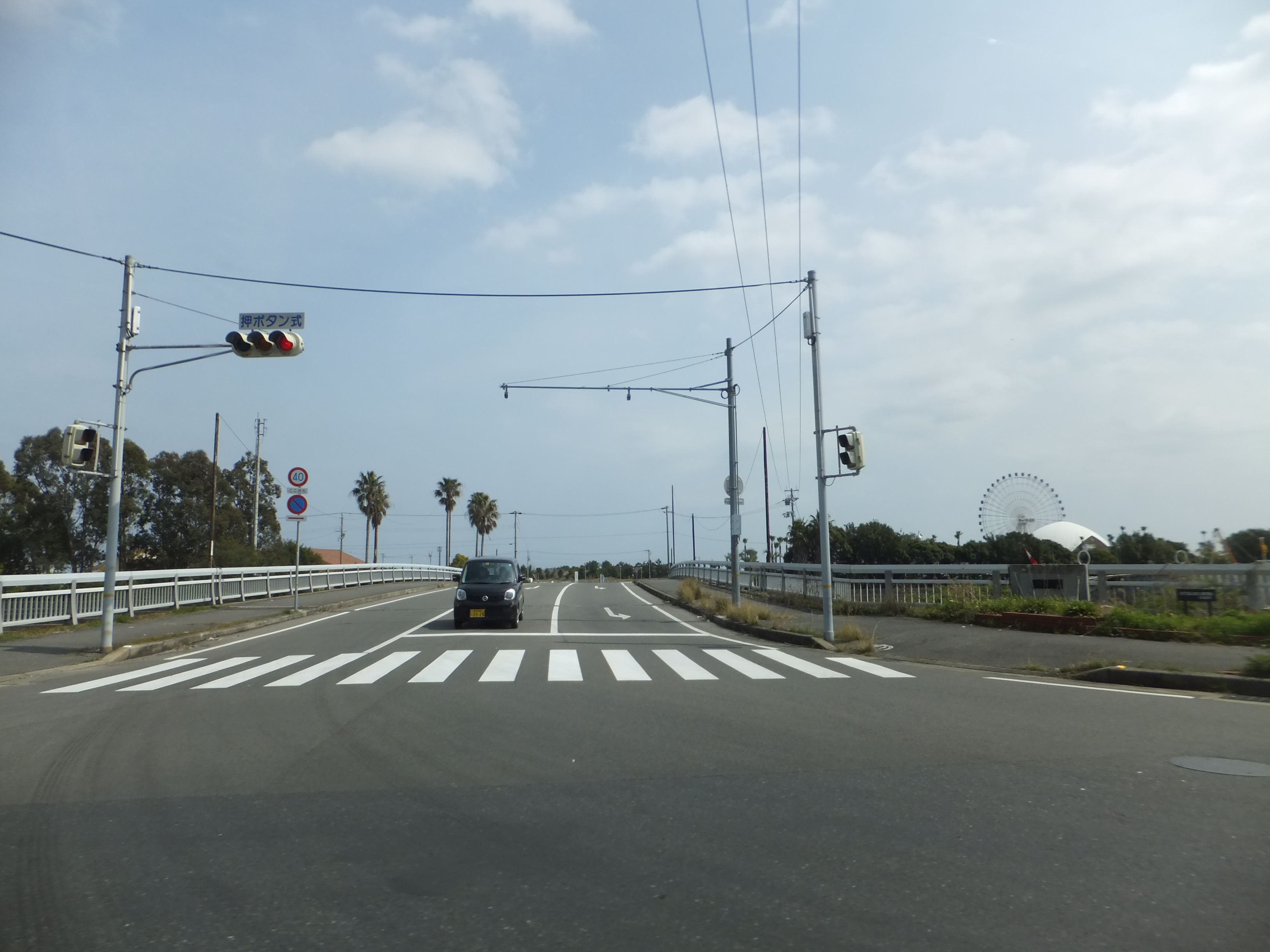 兵庫県淡路市志筑